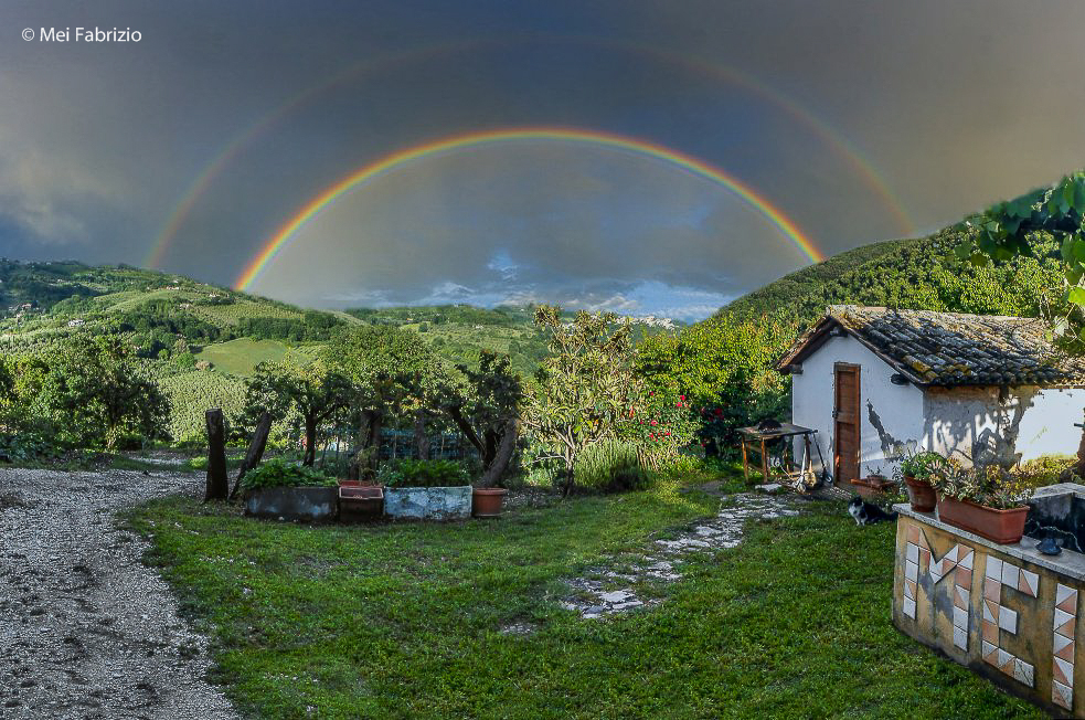 Toffia nell'arcobaleno